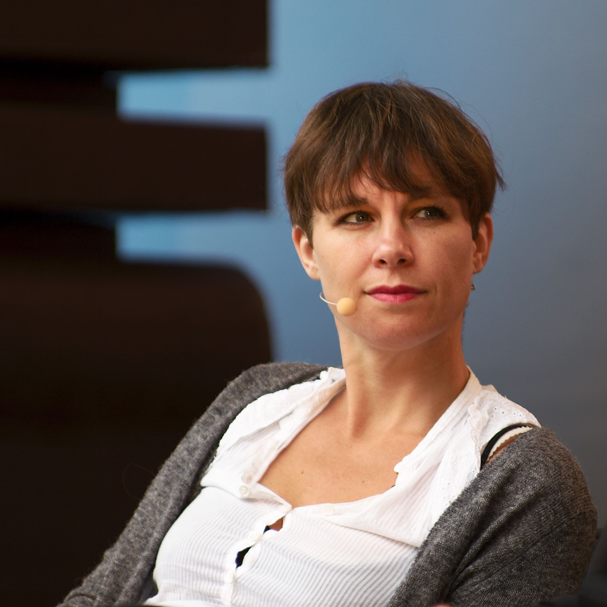 Sara Stridsberg at Oslo bokfestival 2011.